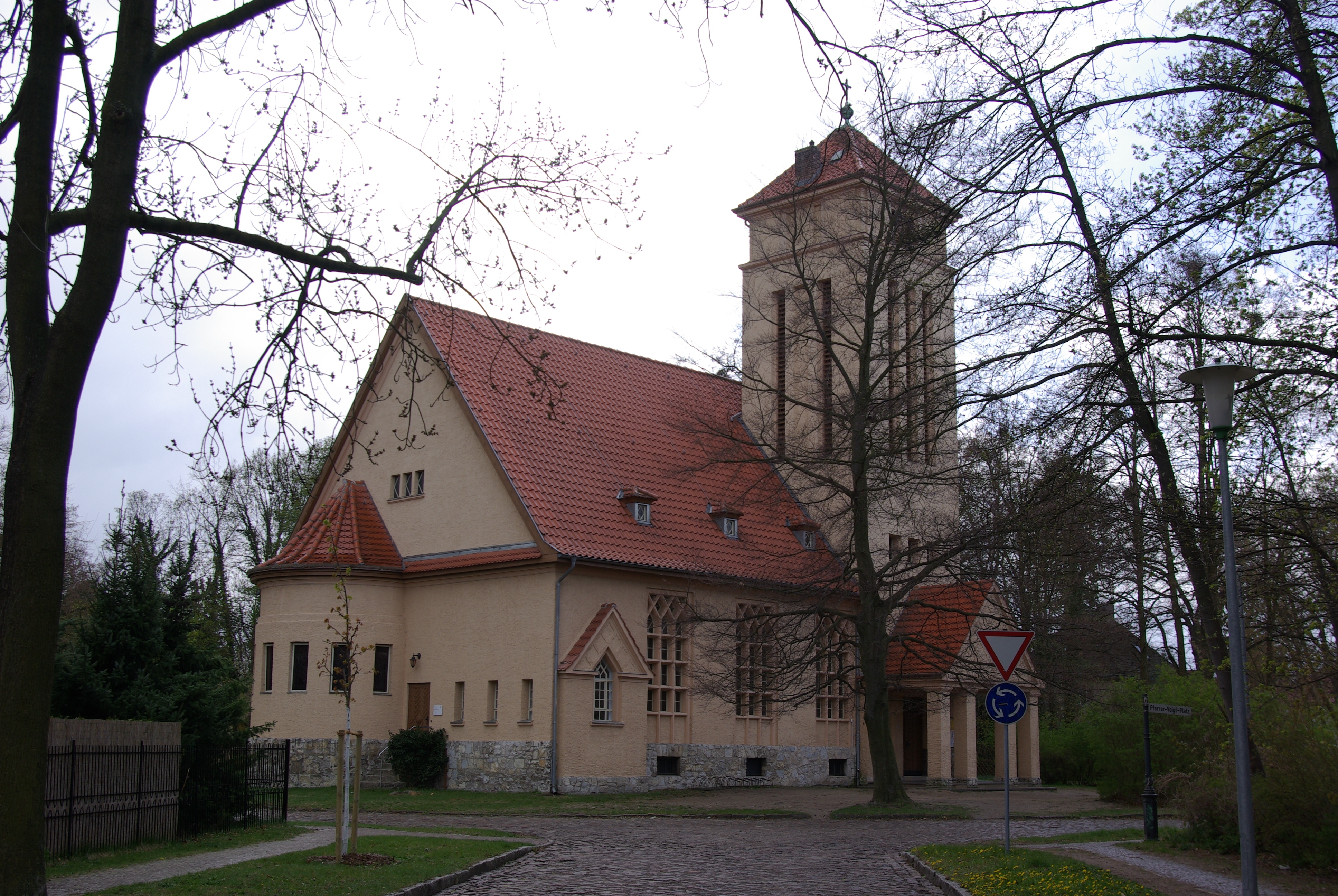 Falkensee Ortsteil Finkenkrug. Die Finkenkruger Kirche wurde von 1924 bis 1926 erbaut. Die Kirche steht unter Denkmalschutz.